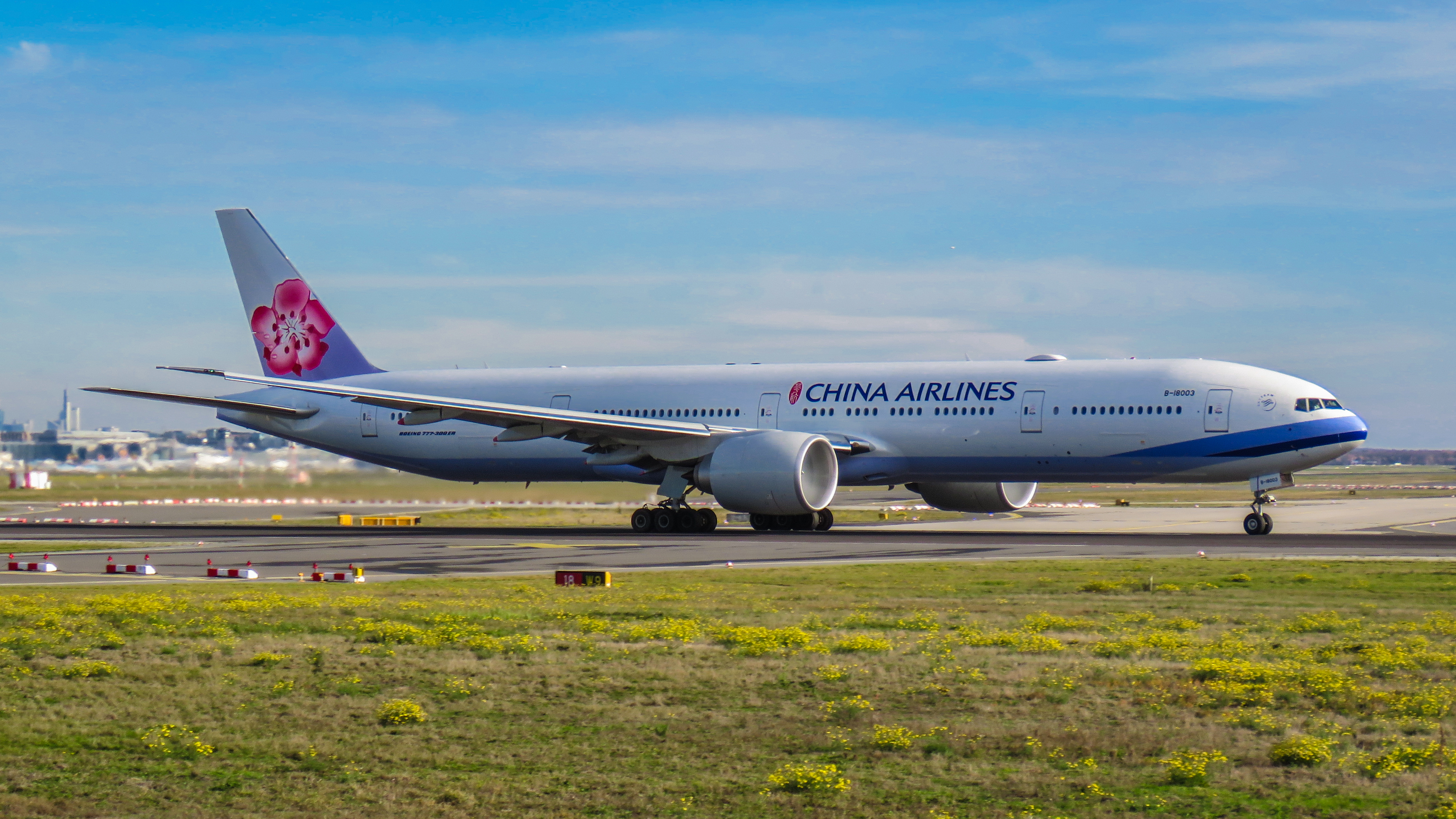 China Airlines Boeing 777-300ER B-18003